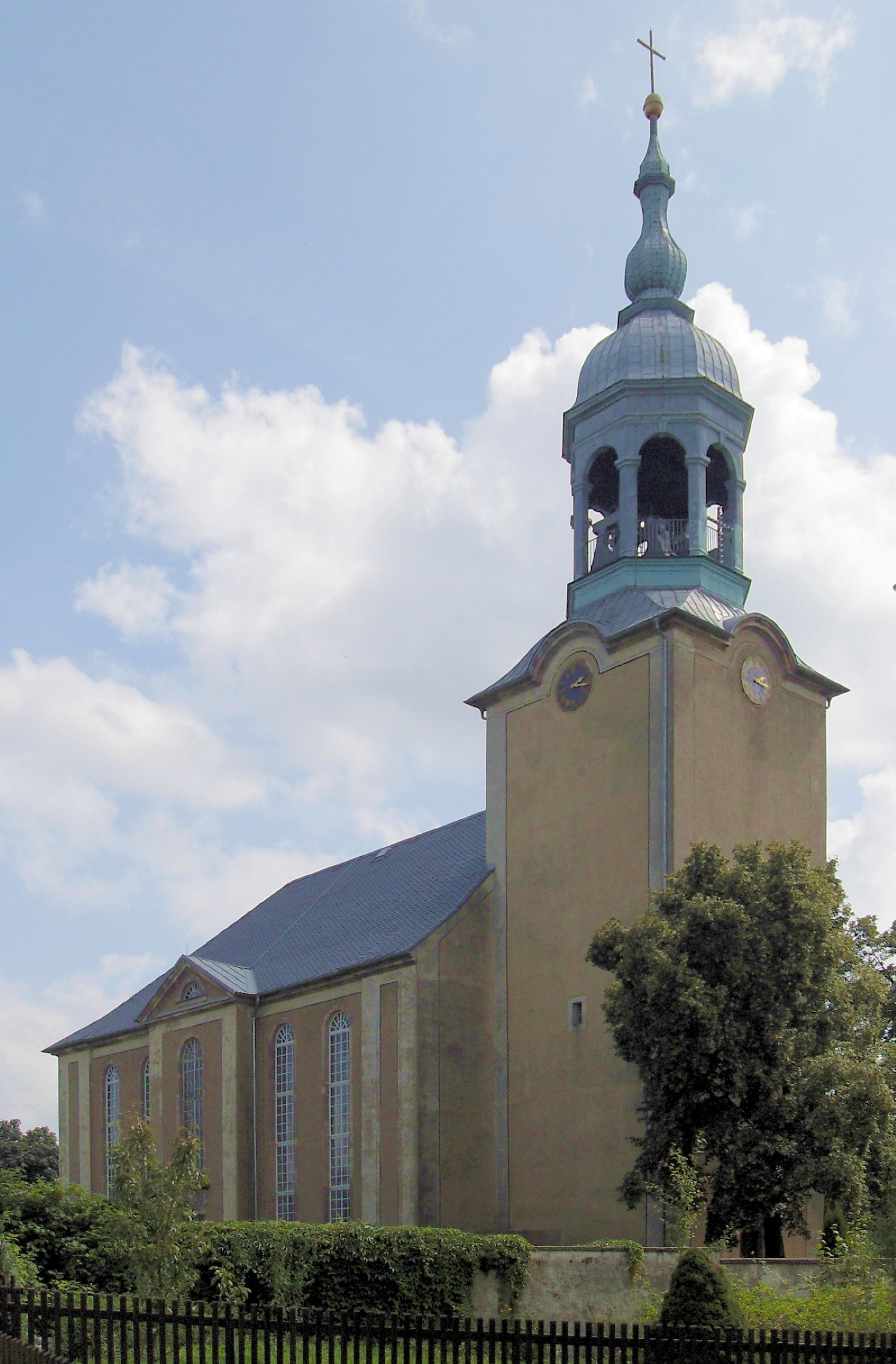 Nordwestseite der Kirche in Großwaltersdorf, Landkreis Mittelsachsen